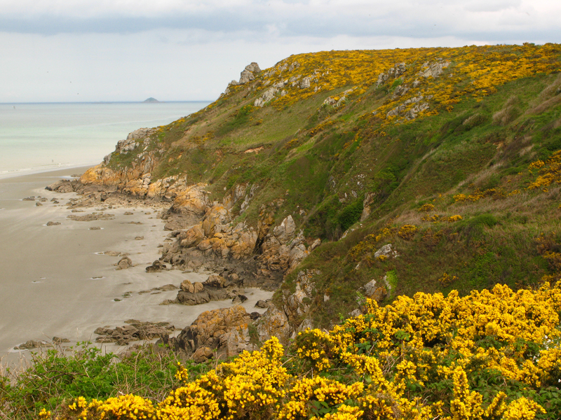 réserve naturelle baie de Saint- Brieuc, falaise de pLanguenoual